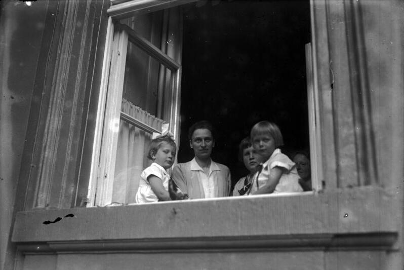 Frau Major von Hindenburg, welche von einem gesunden Knaben entbunden wurde , mit ihren drei Kindern, am Fenster des Reichspräsidentenpalais in der Wilhelmstrasse. Das geborene Kind ist der erste Enkel des Reichspräsidenten von Hindenburg.